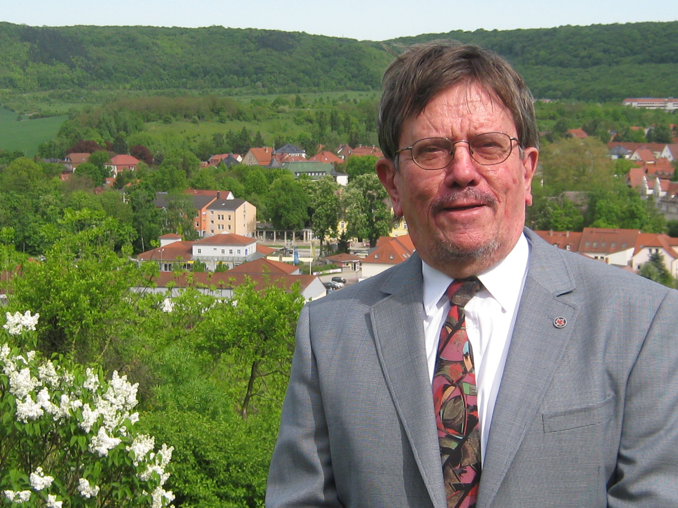 Photographie von Prof. Dr. Hans Peter Hümmer in Bad Kösen